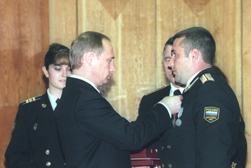 СЕВАСТОПОЛЬ. Вручение государственных наград военнослужащим Черноморского флота. Владимир Путин вручил Звезду Героя капитану Владимиру Валерьевичу Карпушенко.